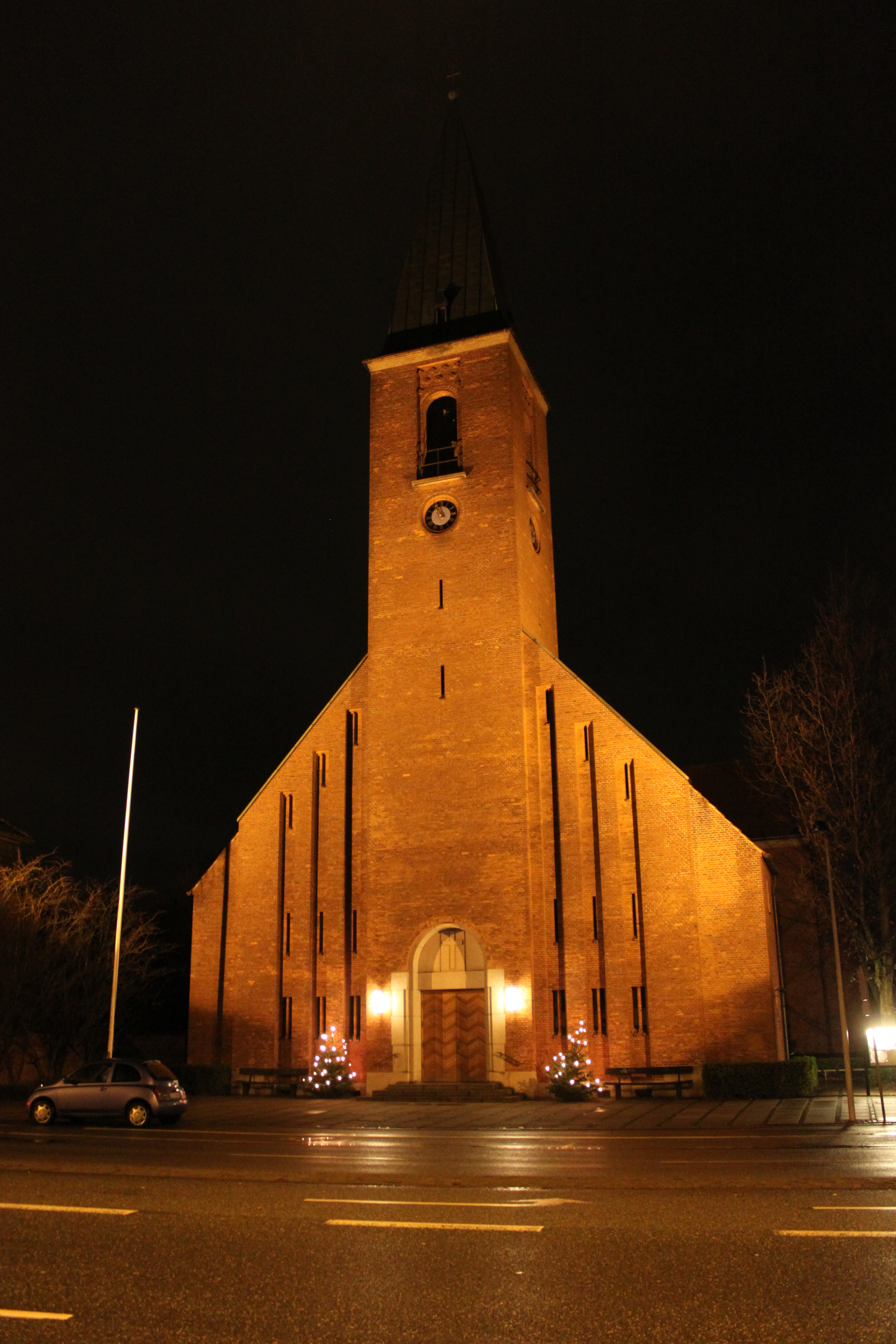 Aftenbillede af Helleruplund Kirke ved juletid med udsmykning